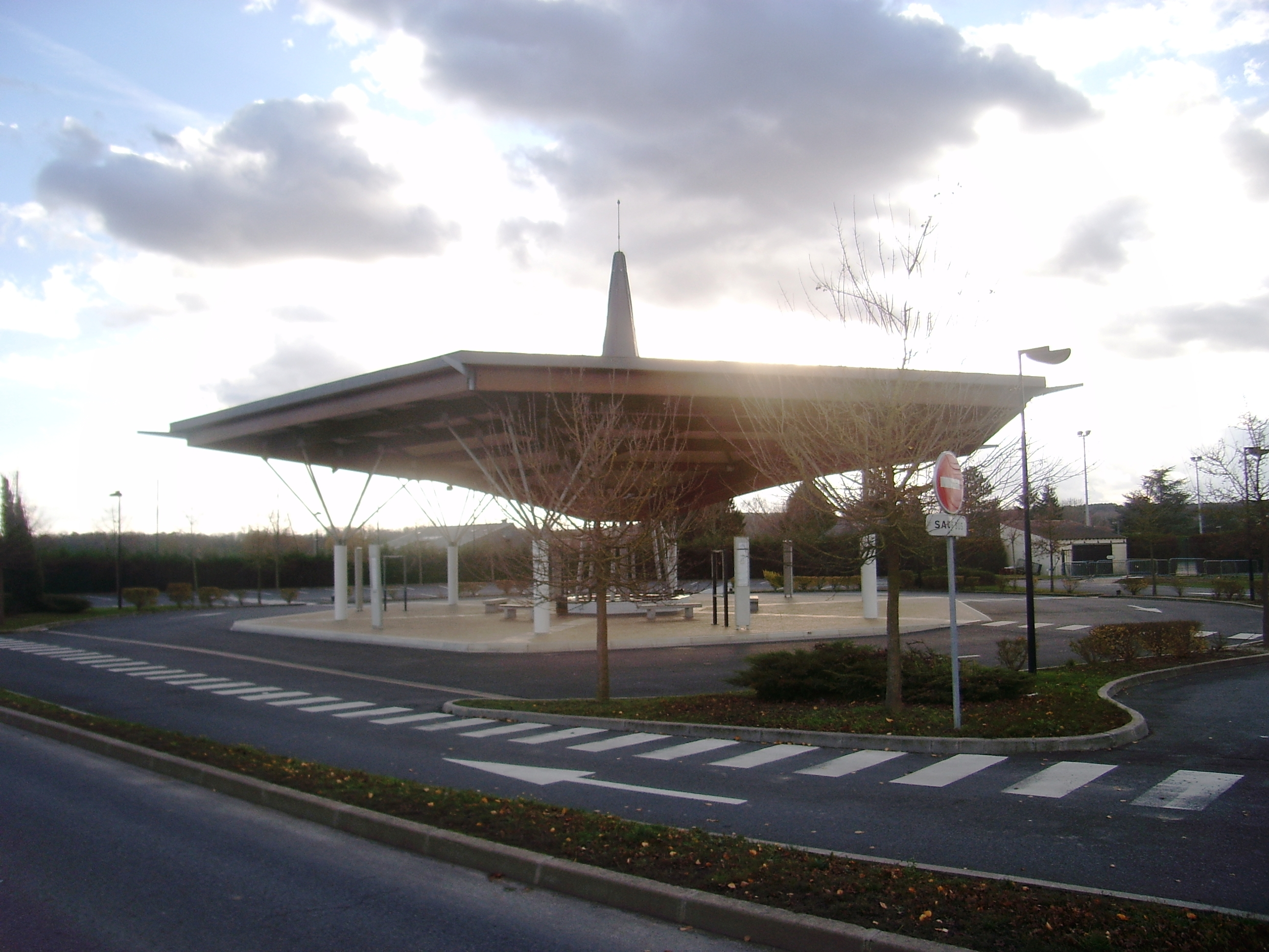 Gare routière de Milly-la-Forêt (91)